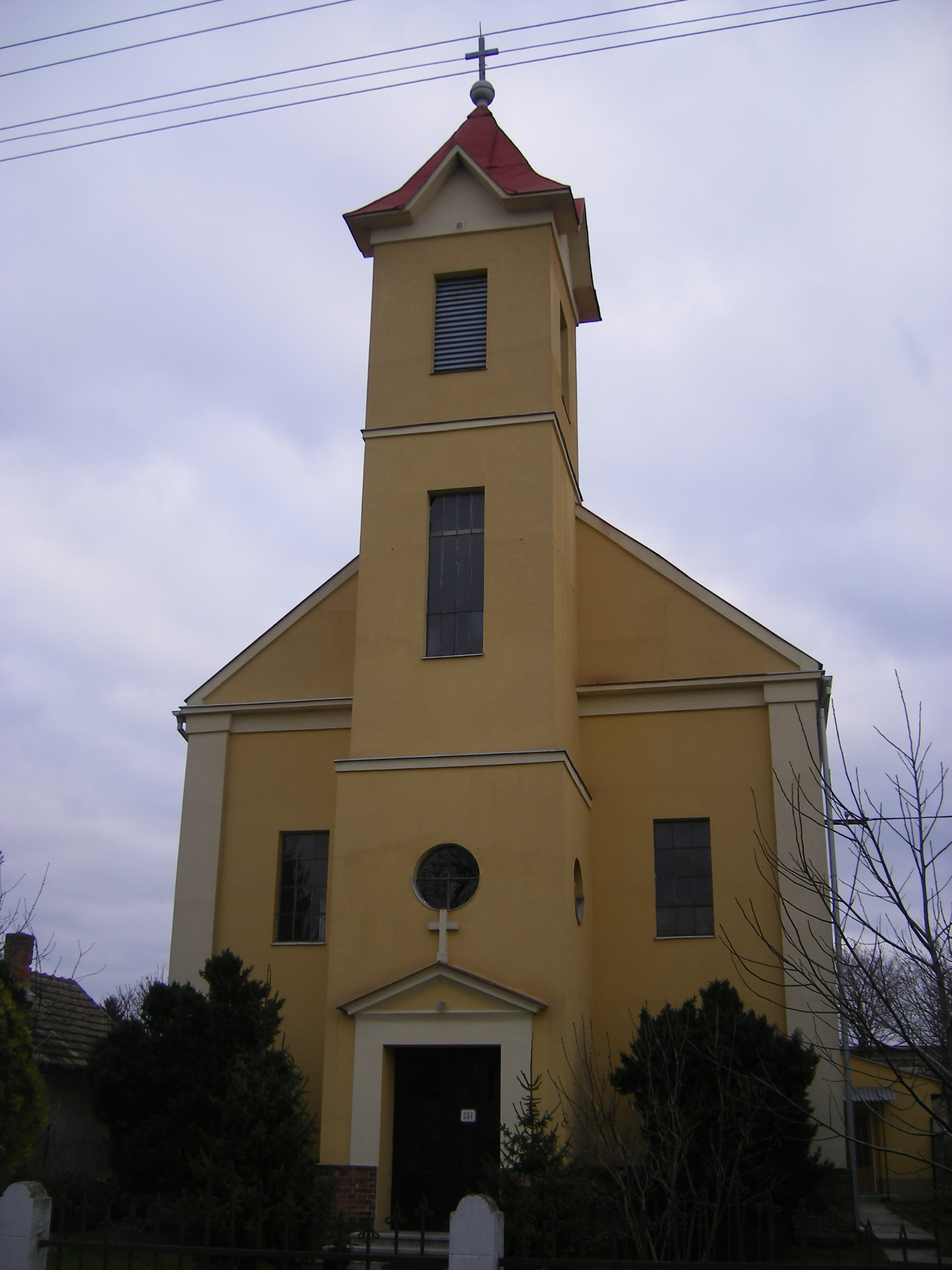 Csallóközaranyos - Katolikus templom